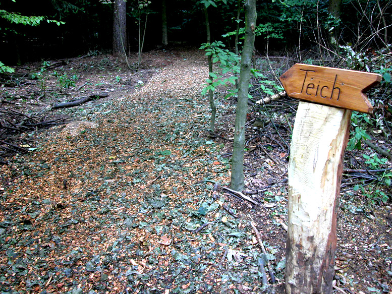 Teiche in Benrather Forst, Düsseldorf